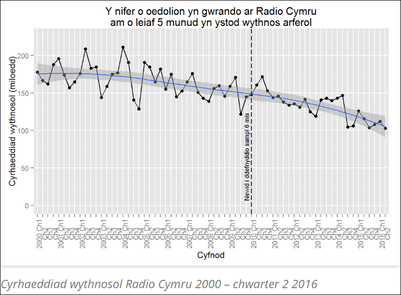 Siart